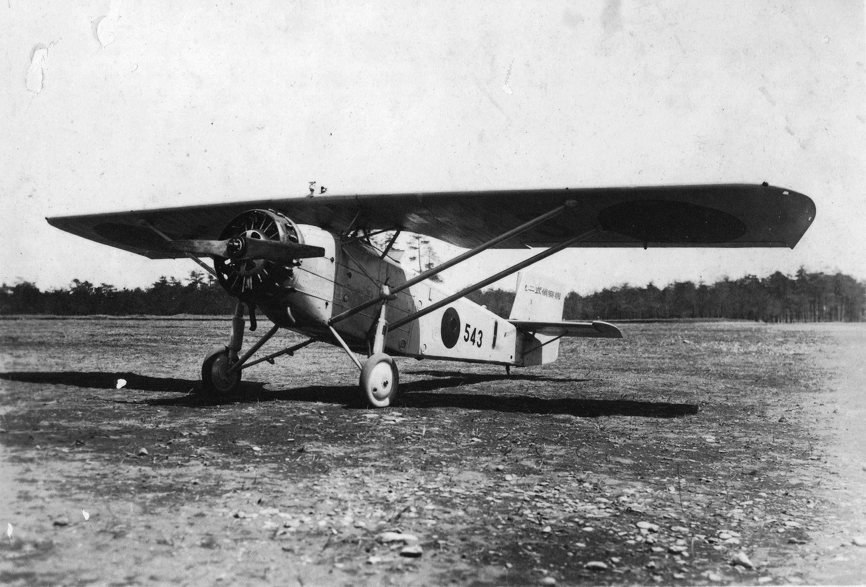 92式偵察機